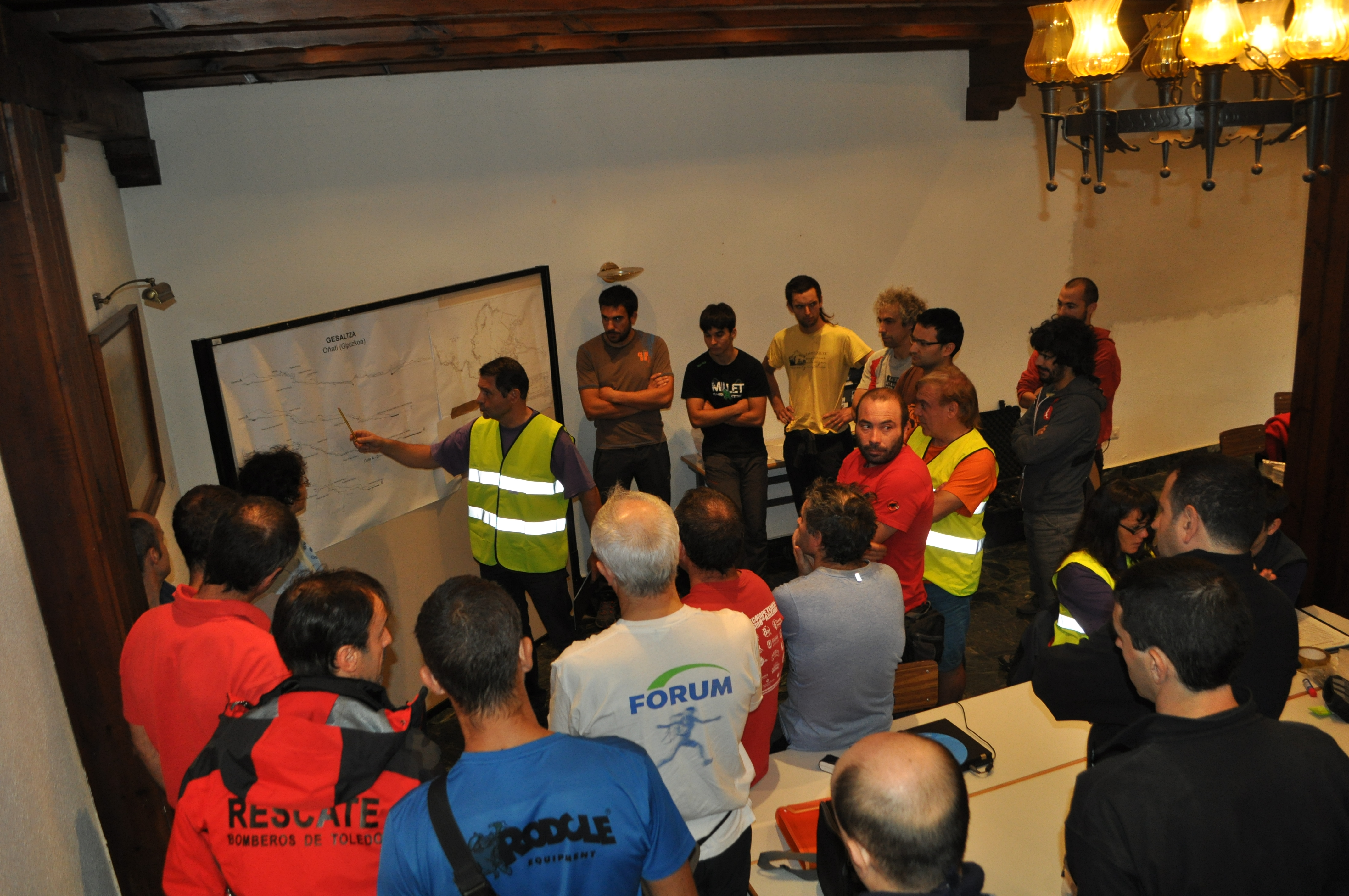 Euskal Espeleo Laguntza taldearen simulakro orokorra 2013ean (Gesaltzako lizuna, Araotz, Oñati, Gipuzkoa).